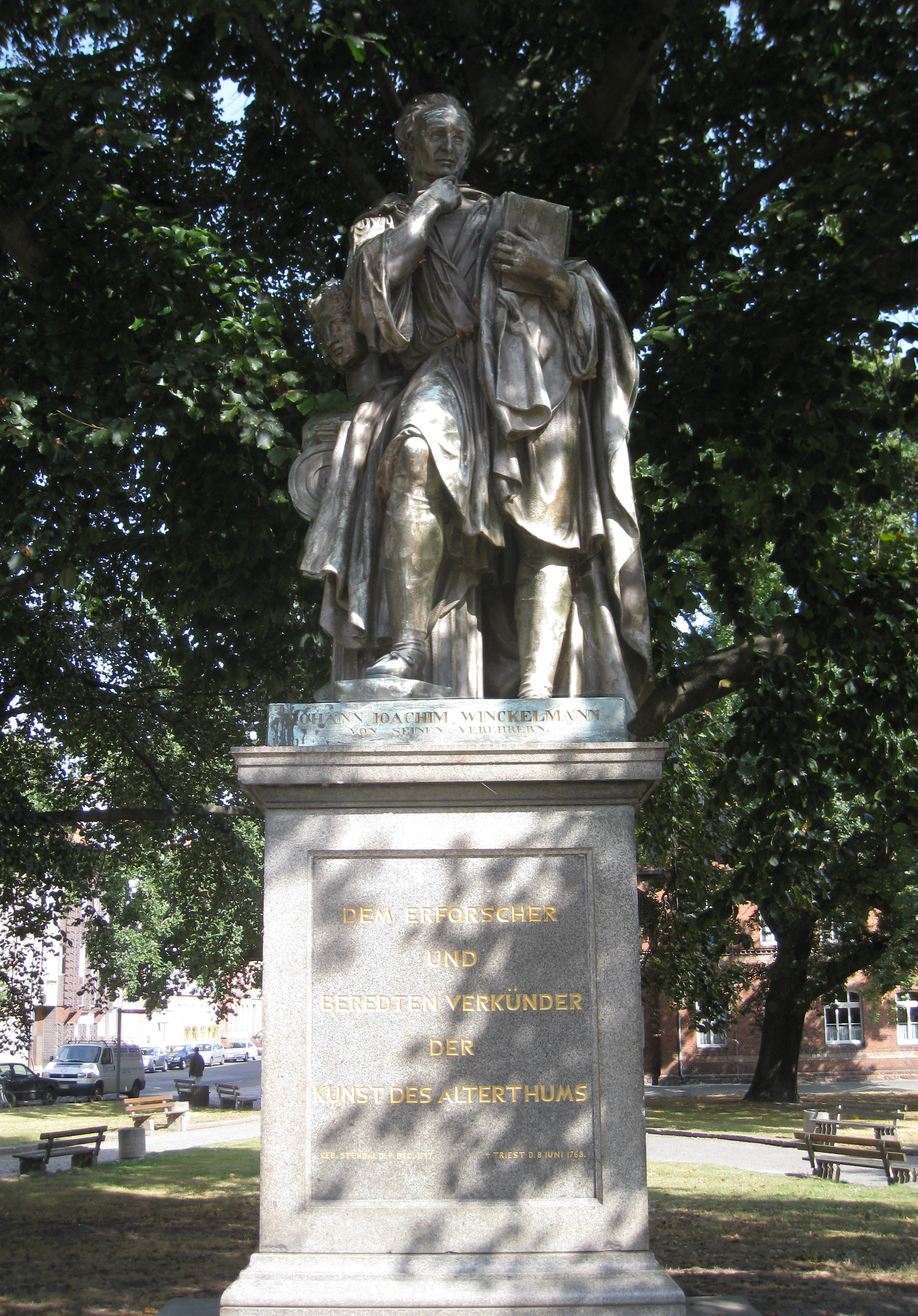 Wichmann, Ludwig Wilhelm 1840-1850 Statue Johann Joachim Winckelmann in Stendal (Bronze), auch als Marmorstatue in der Nationalgalerie Berlin